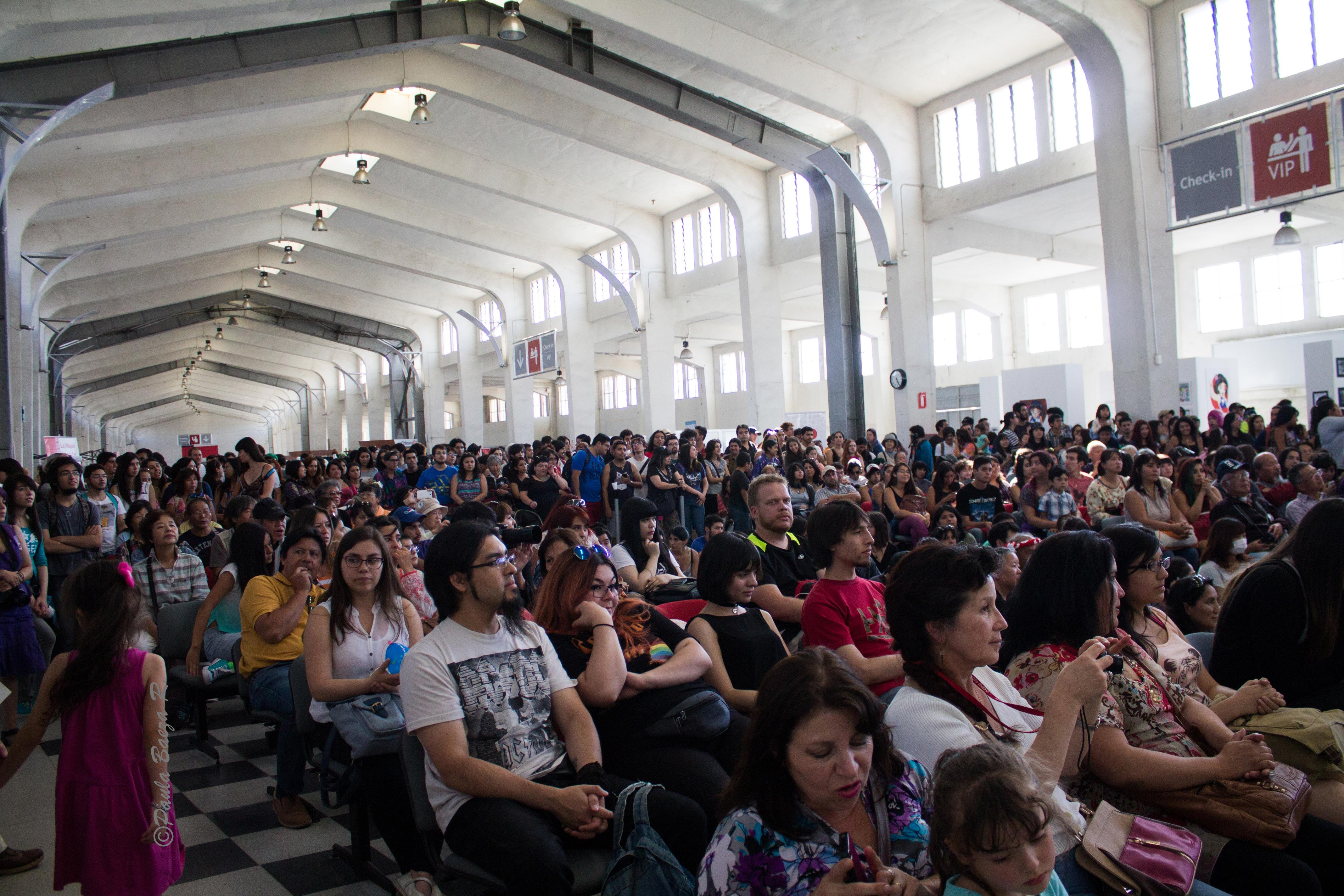 バルパライソ日本祭りの風景